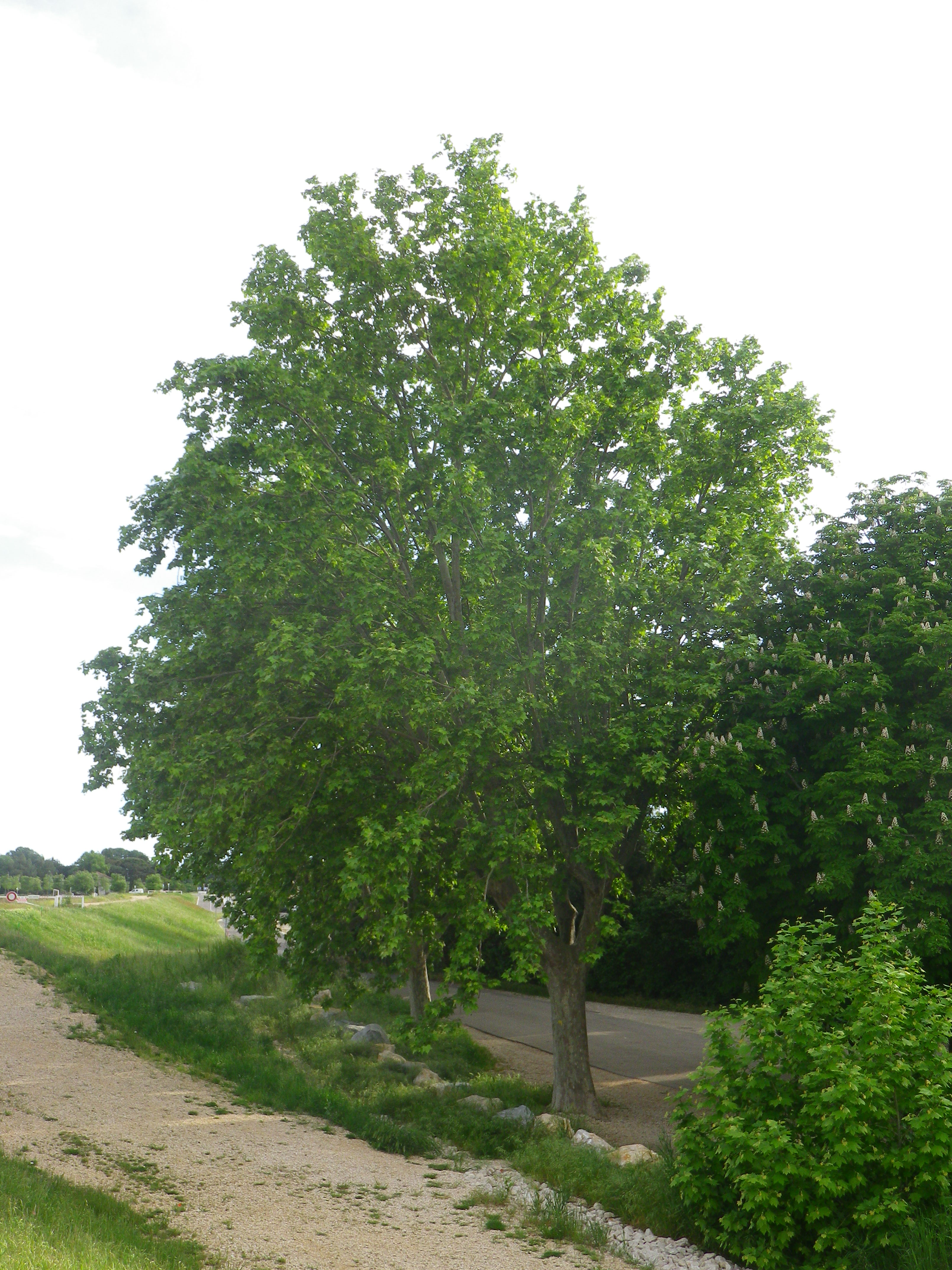 Sujet âgé